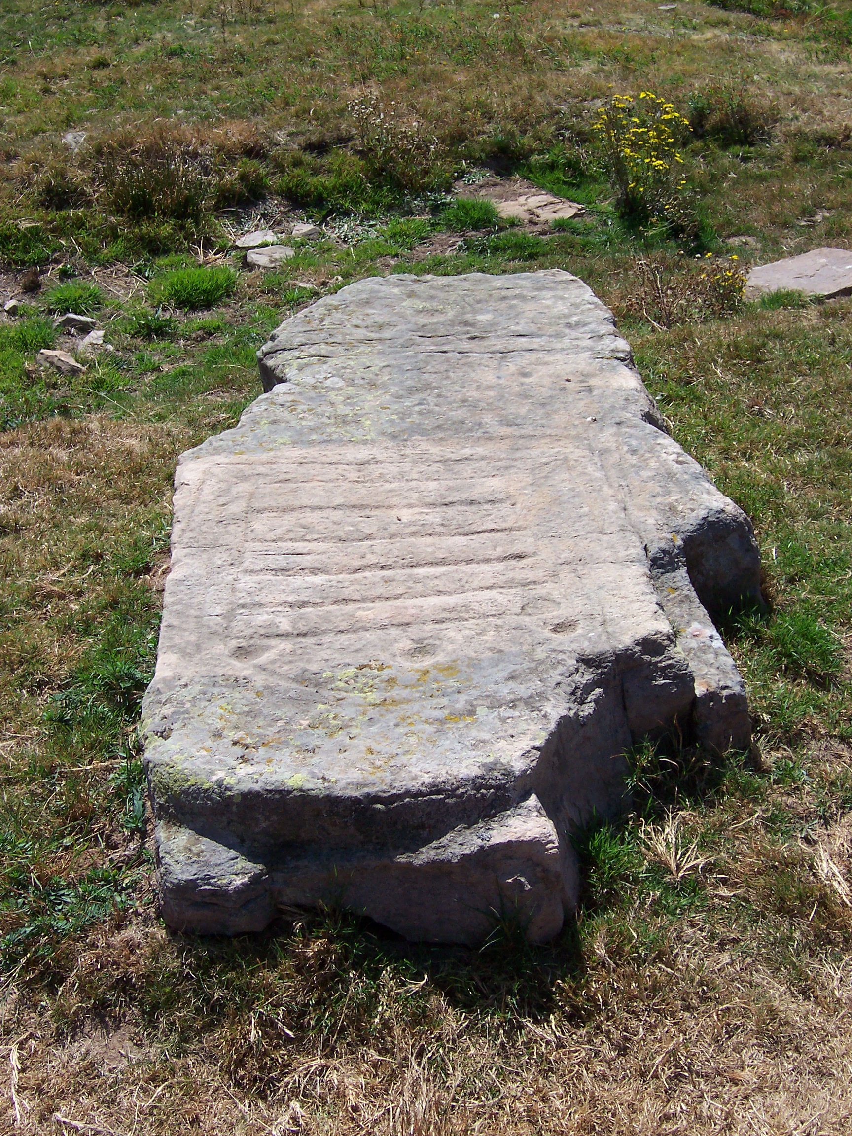 Ídolo de Sejos. Laja antropomórfica con grabados en el collado de Sejos, Cantabria. Parte de un cromlech compuesto por tres menhires.